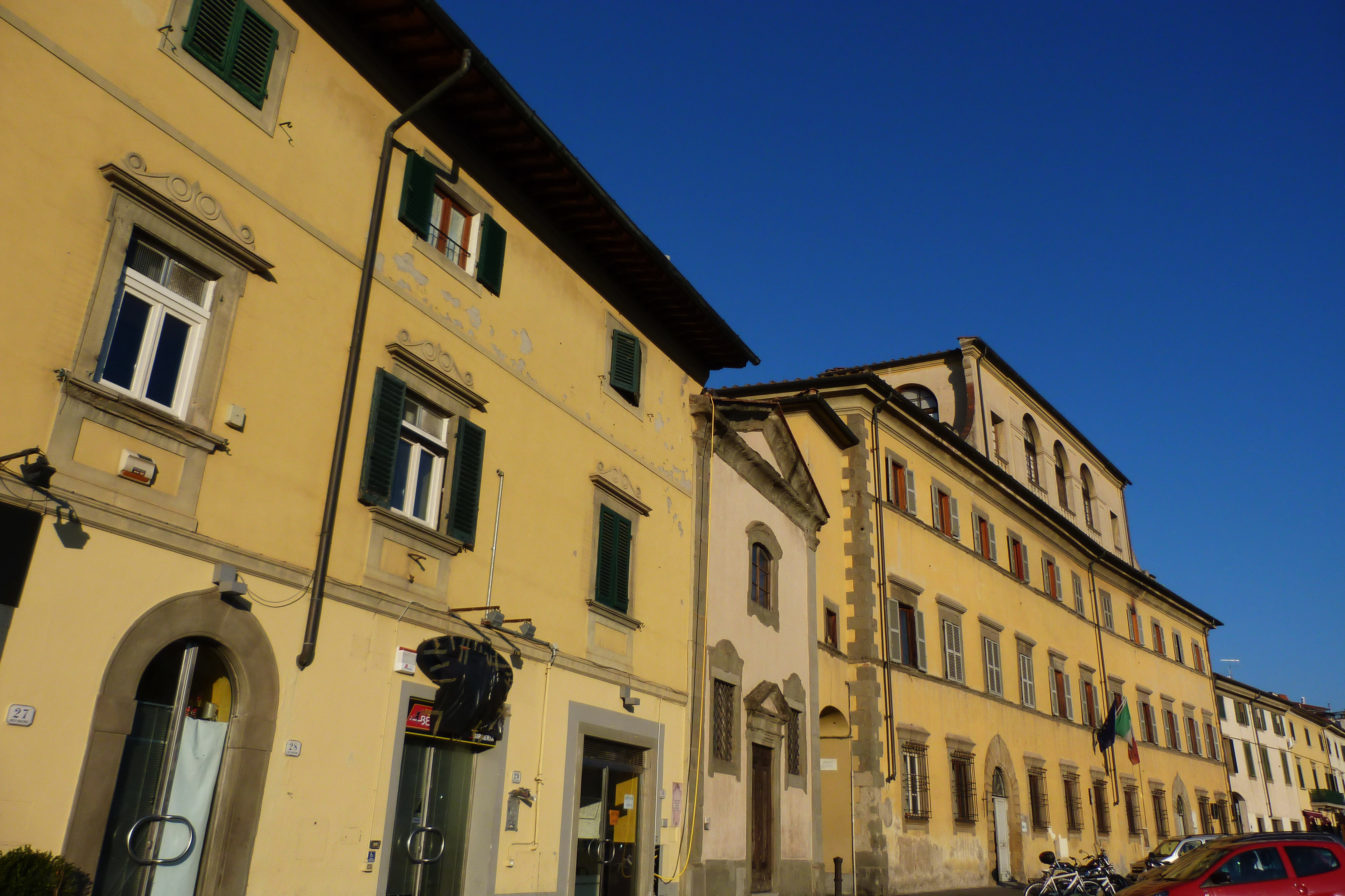 Piazza Mercatale, Prato, Toscana, Italia This is a photo of a monument which is part of cultural heritage of Italy.